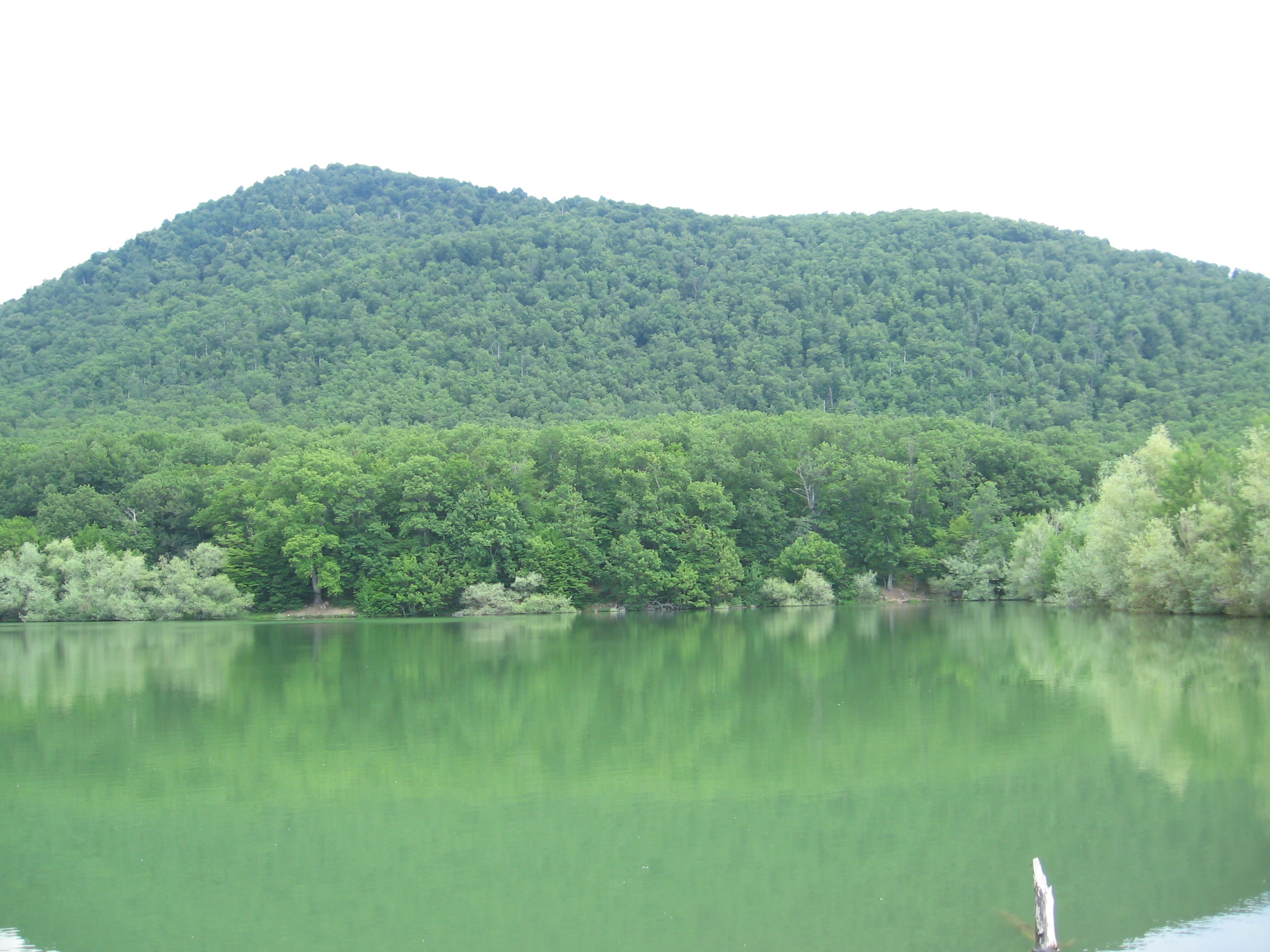 Урага: Фото